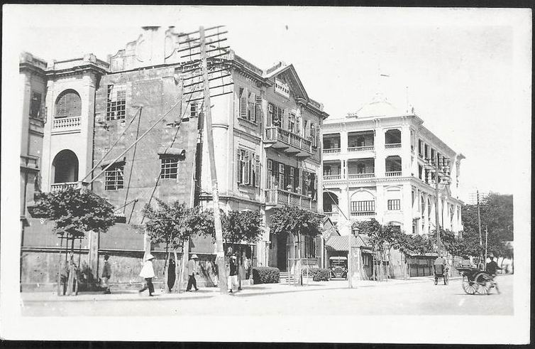 1930年代初，位於廣東省財政廳西側的中華民國廣州市政府。